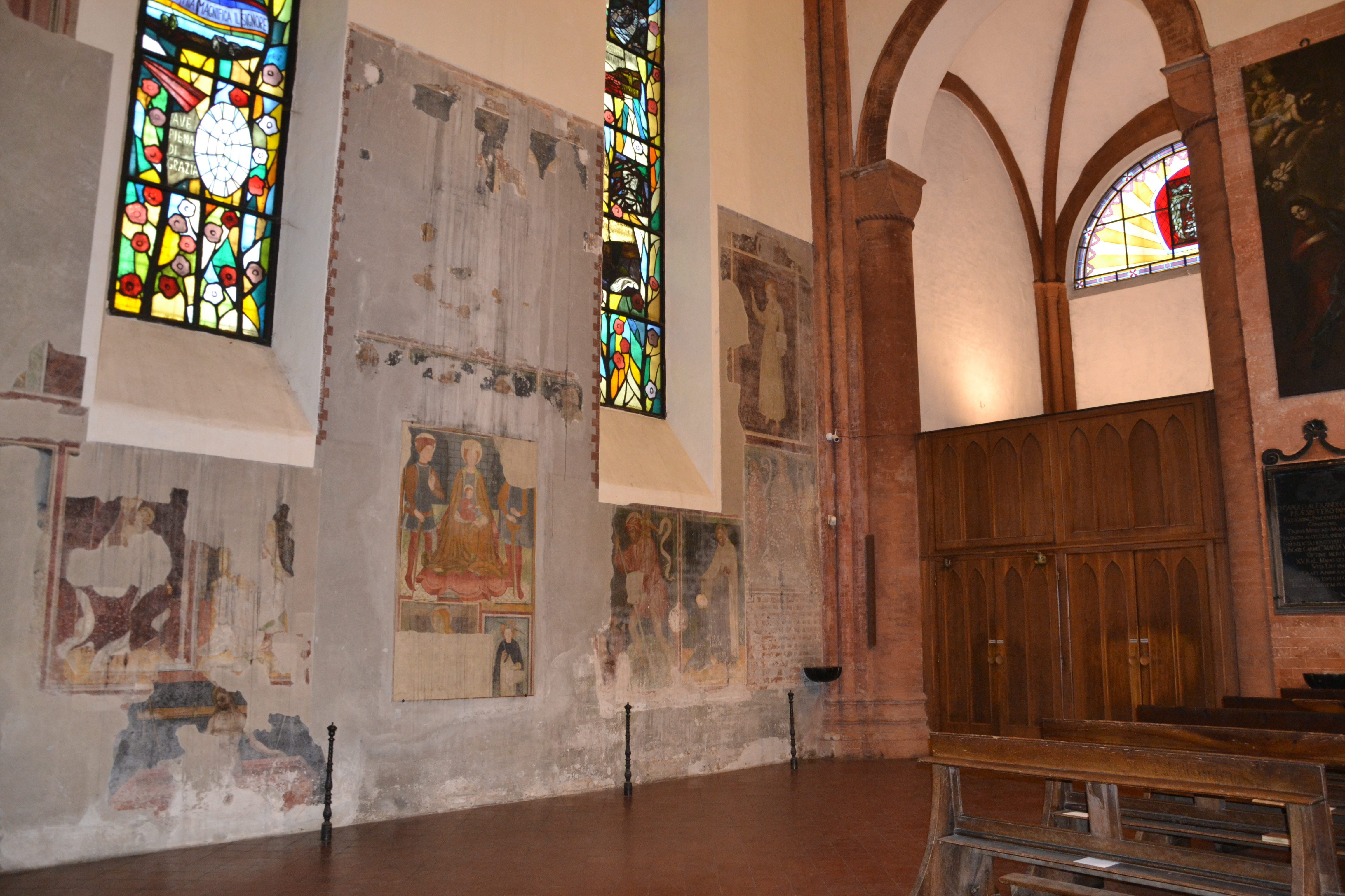 Chiesa di Santa Maria del Carmine (Pavia)